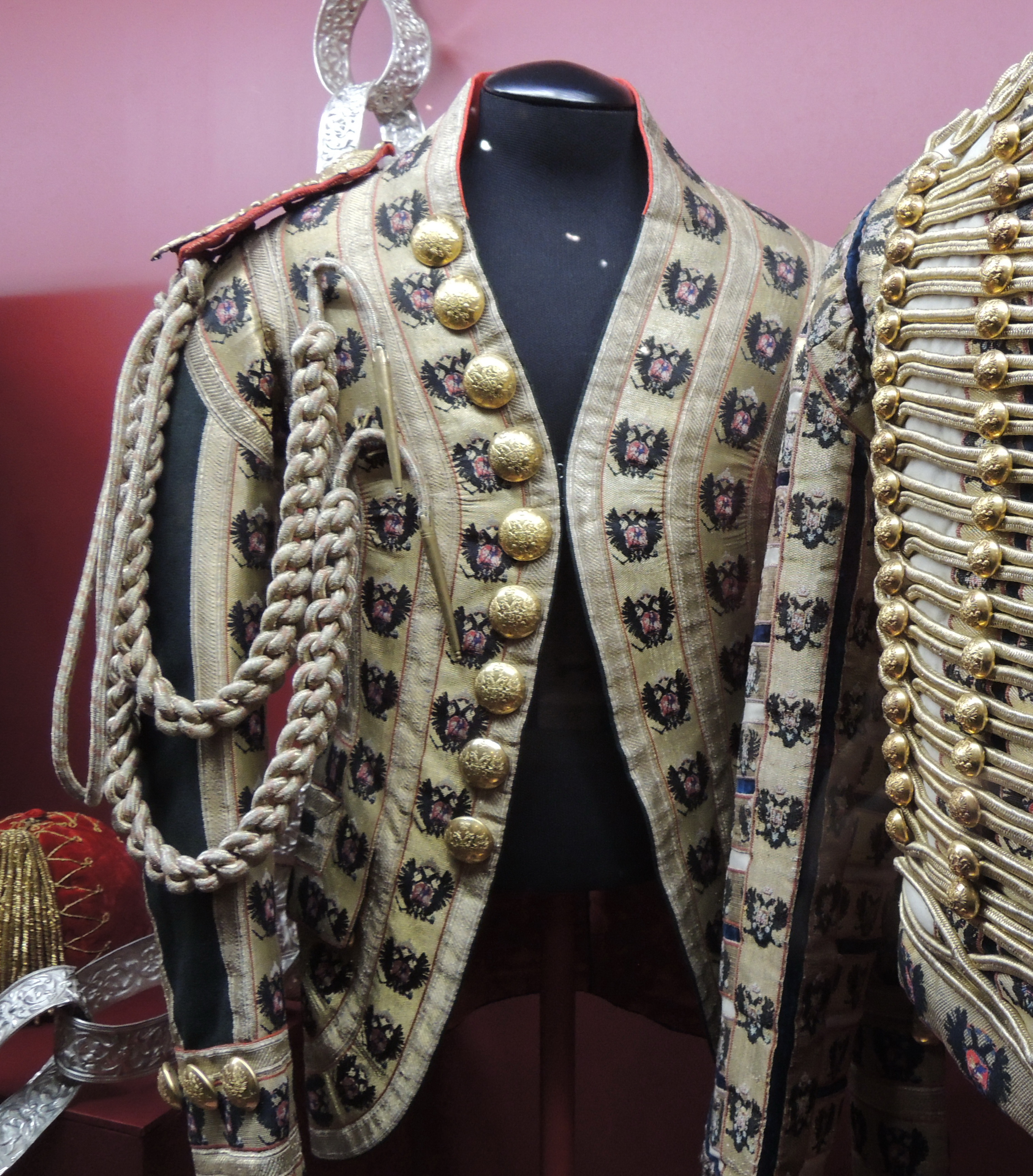 Парадный кафтан лейб-форейтора Придворно-конюшенного ведомства образца 1881 года, выходивший в состав парадной статс-ливреми лейб-форейтора. Из черного сукна. 23 гербовые пуговицы. Их носили придворные служители - лакеи, кучеры, скороходы.. Россия, 1880-90-е гг. ММК.